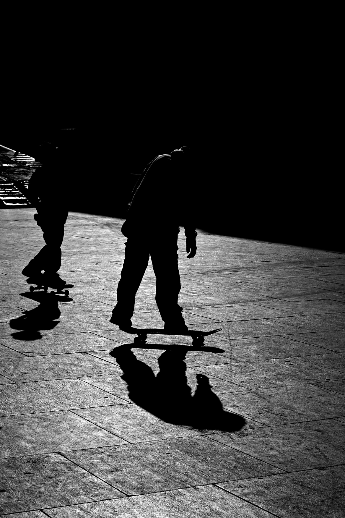 Skateboarders.